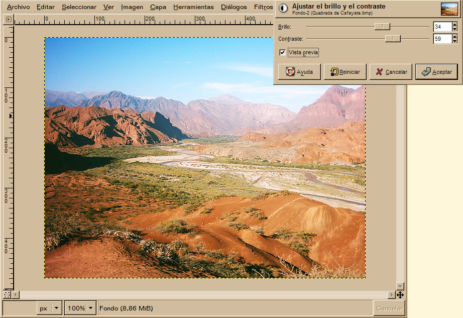 Ejemplo de mejora de brillo y contraste en Gimp.